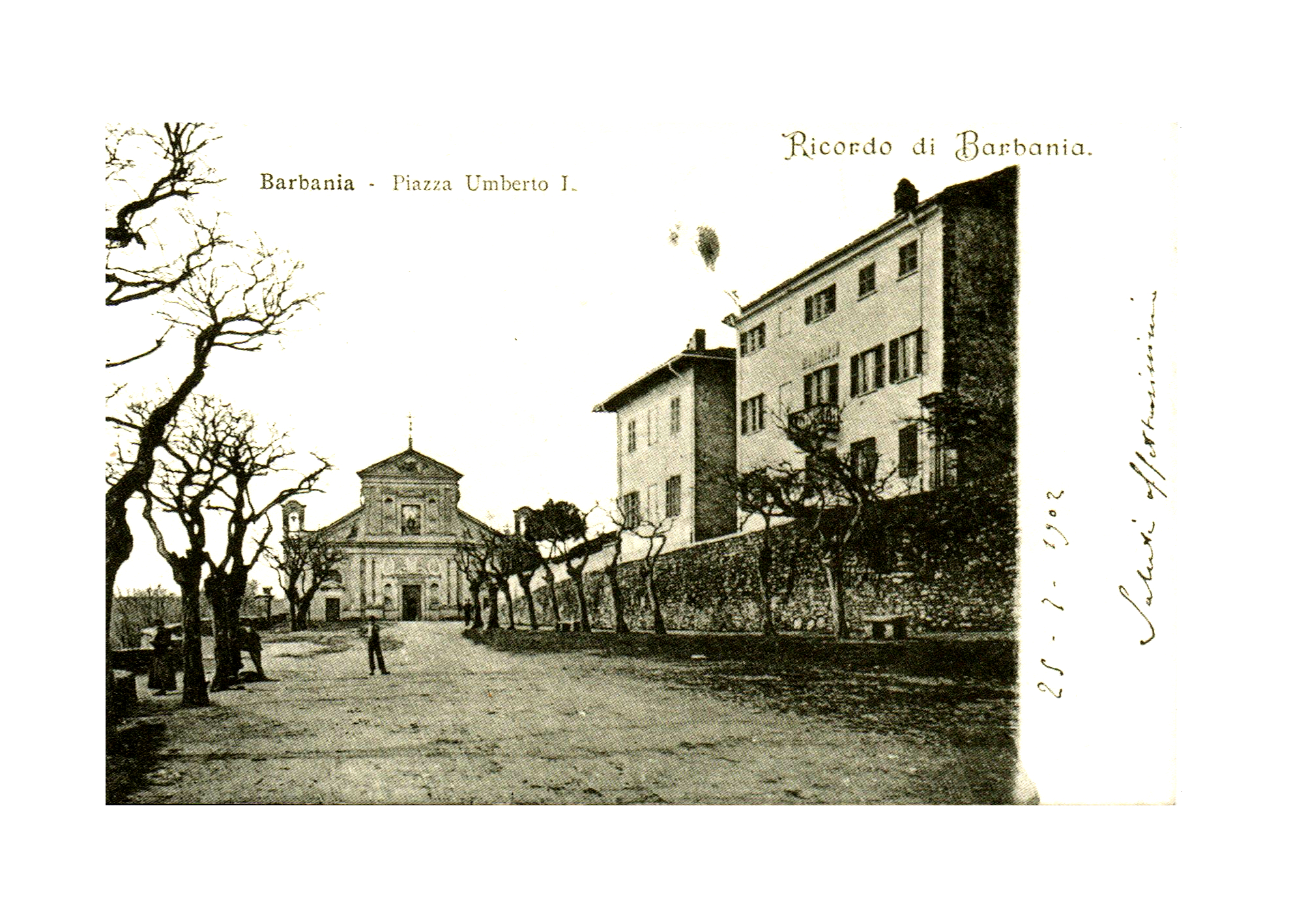 La piazza della chiesa un una cartolina antica